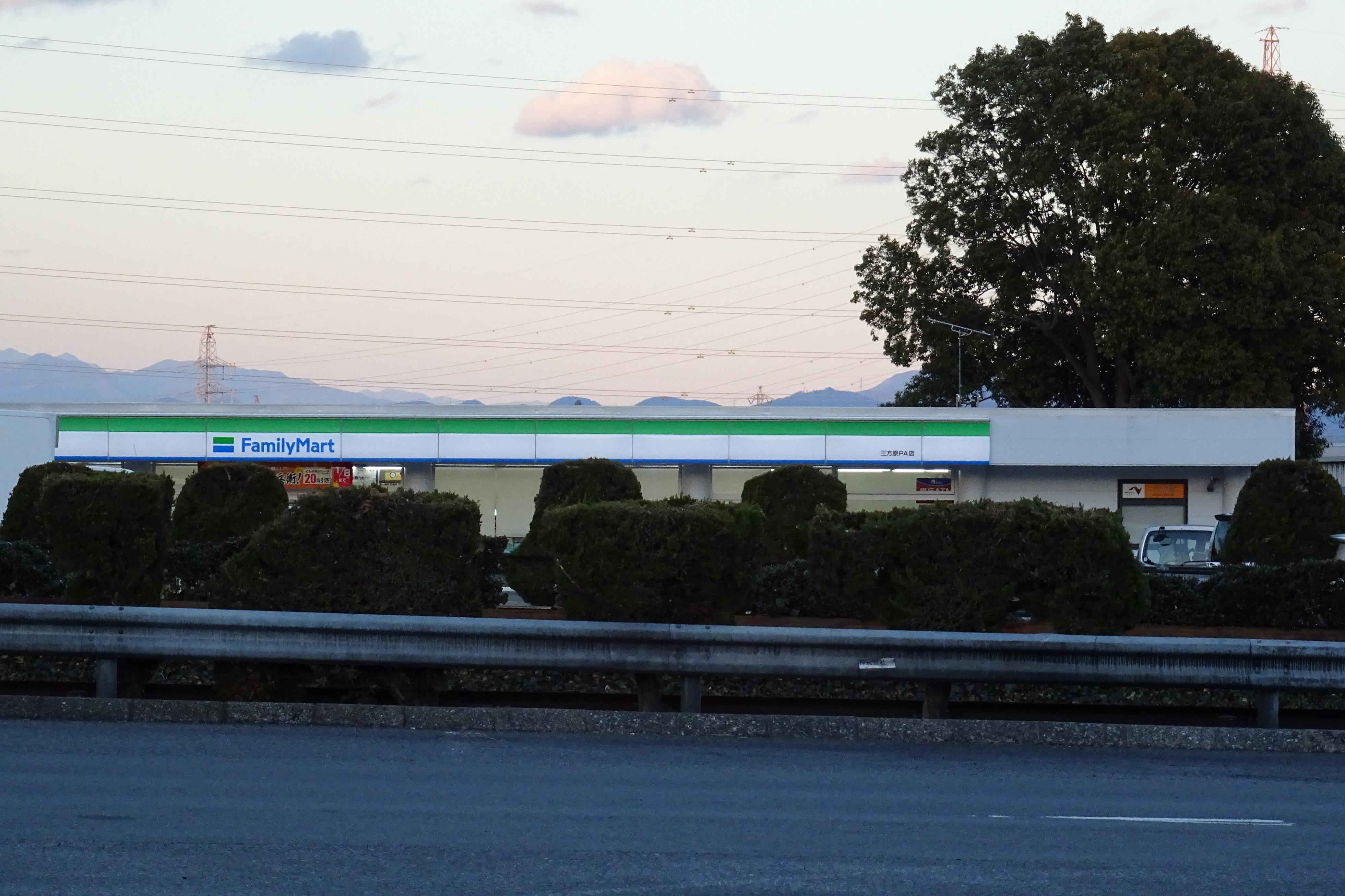 三方原上り